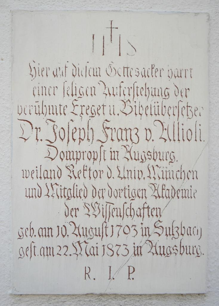 Epitaph des Theologen Joseph Franz von Allioli, 1793-1873, an der Kirche St. Michael des Hermanfriedhofs in Augsburg